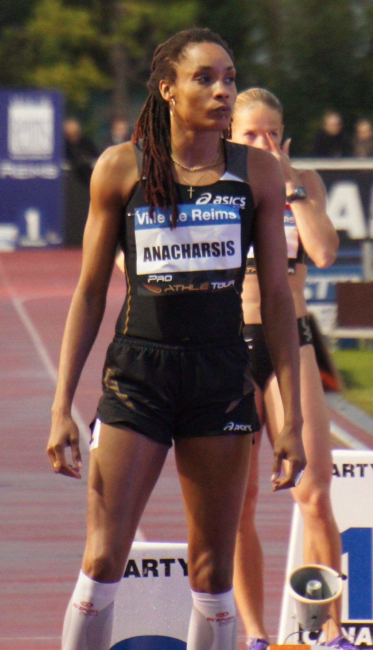 Phara Anacharsis lors des Rencontres d'athlétisme de Reims 2013.